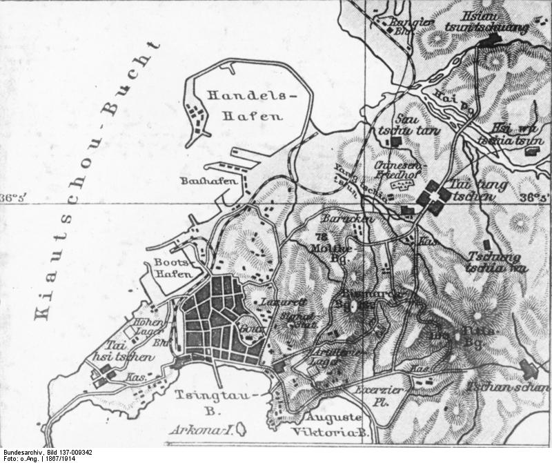 Karte von Tsingtau und Umgebung China, Tsingtau.- Karte von Tsingtau und Umgegend.